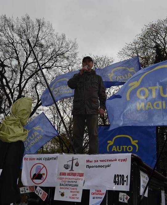 Павличенко Дмитрий